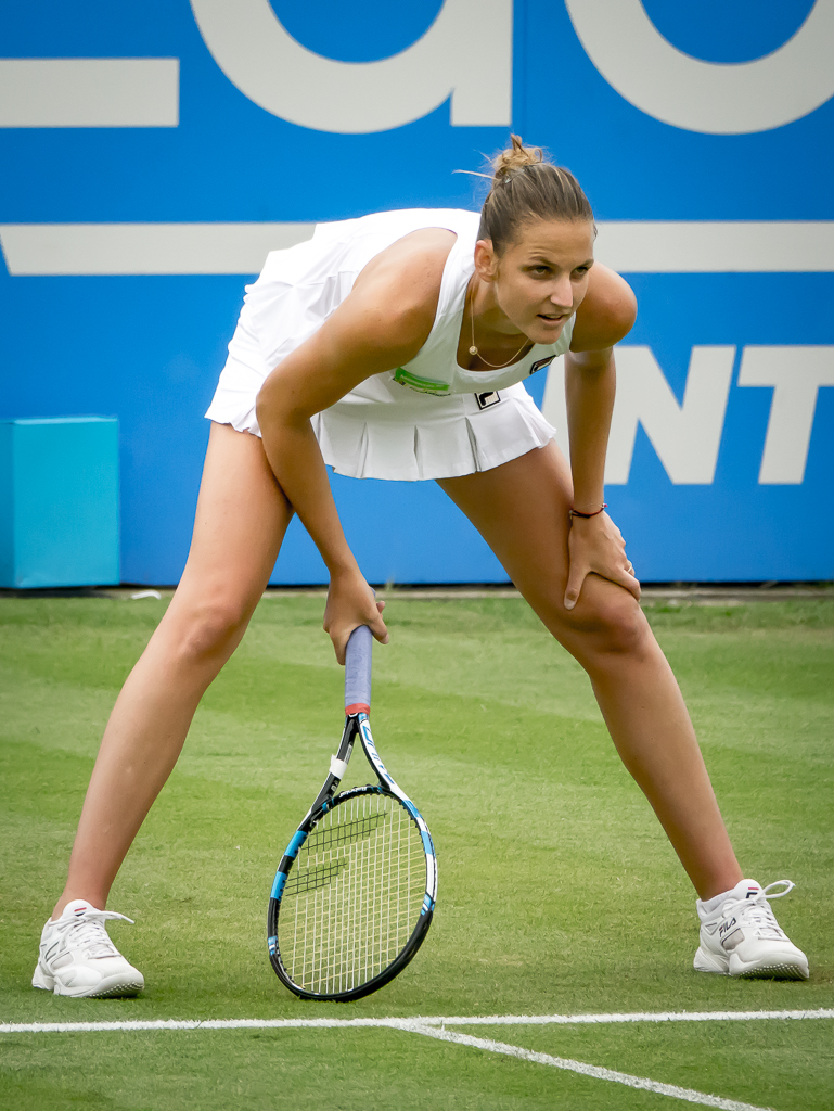 Pliskova - Eastbourne